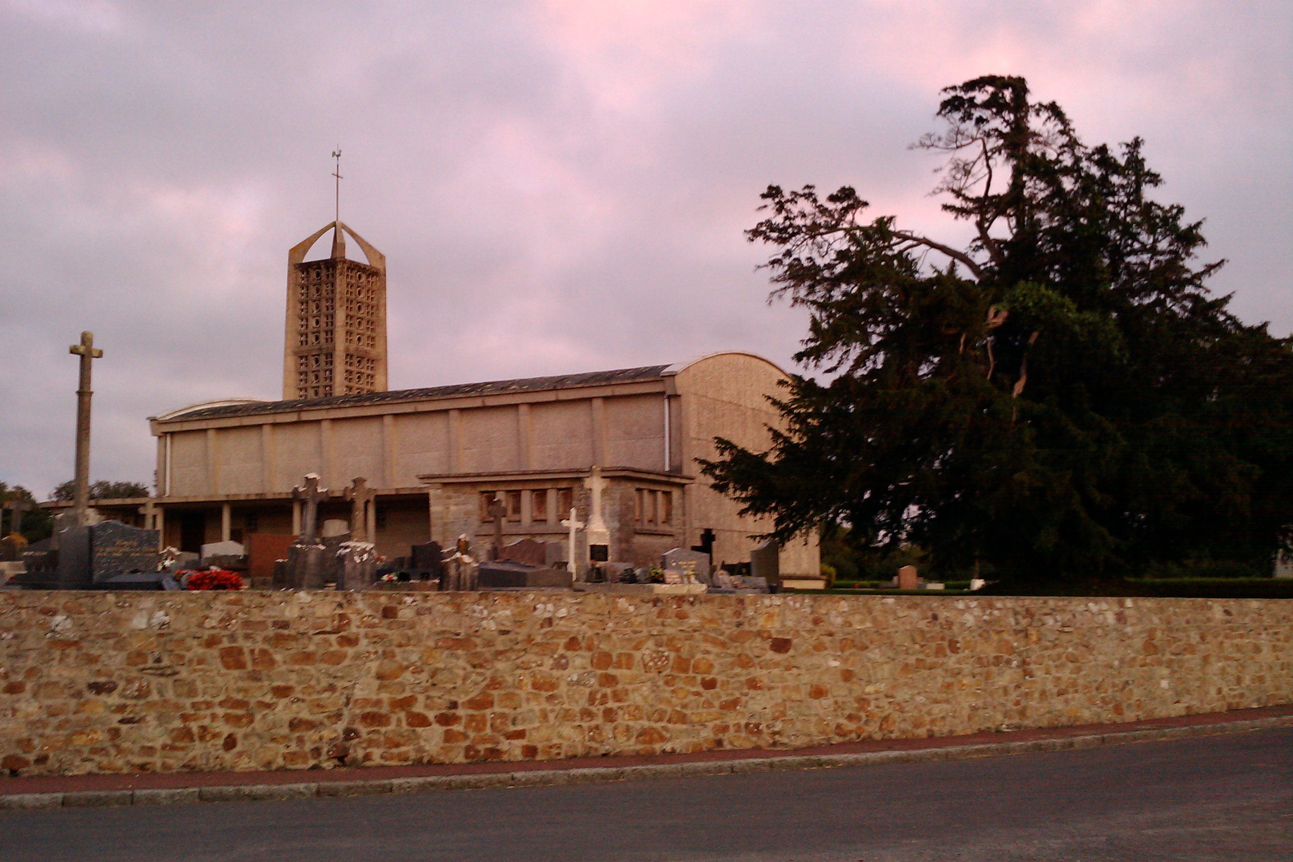 Laulne